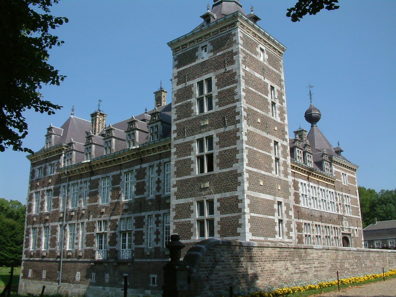 Description Kasteel Eijsden Date3-8-2003SourceOwn work by the original uploaderAuthorPivosPermission(Reusing this file) Licentie verstrekt door Pierre Vossen Kasteel Eijsden